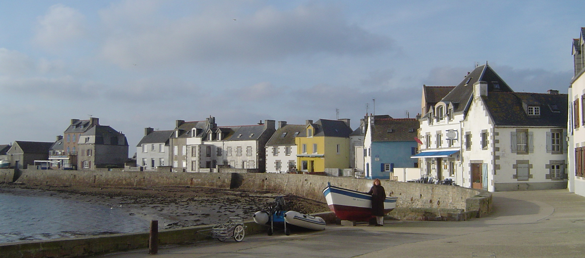 Photo prise par moi-même en décembre 2005 sur le quai sud ou comme disent les sénans la calcau.